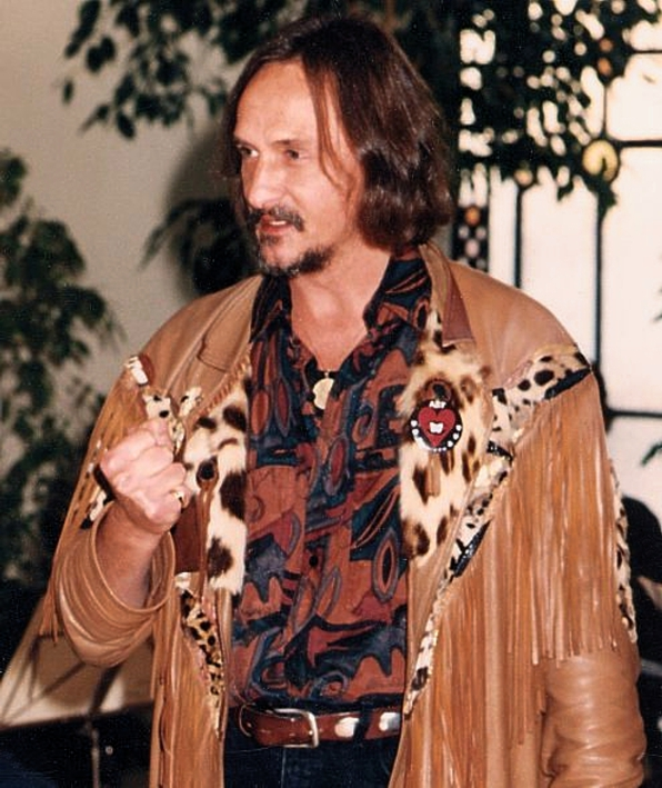 Merlin Flu, Finanzministerium NRW Düsseldorf